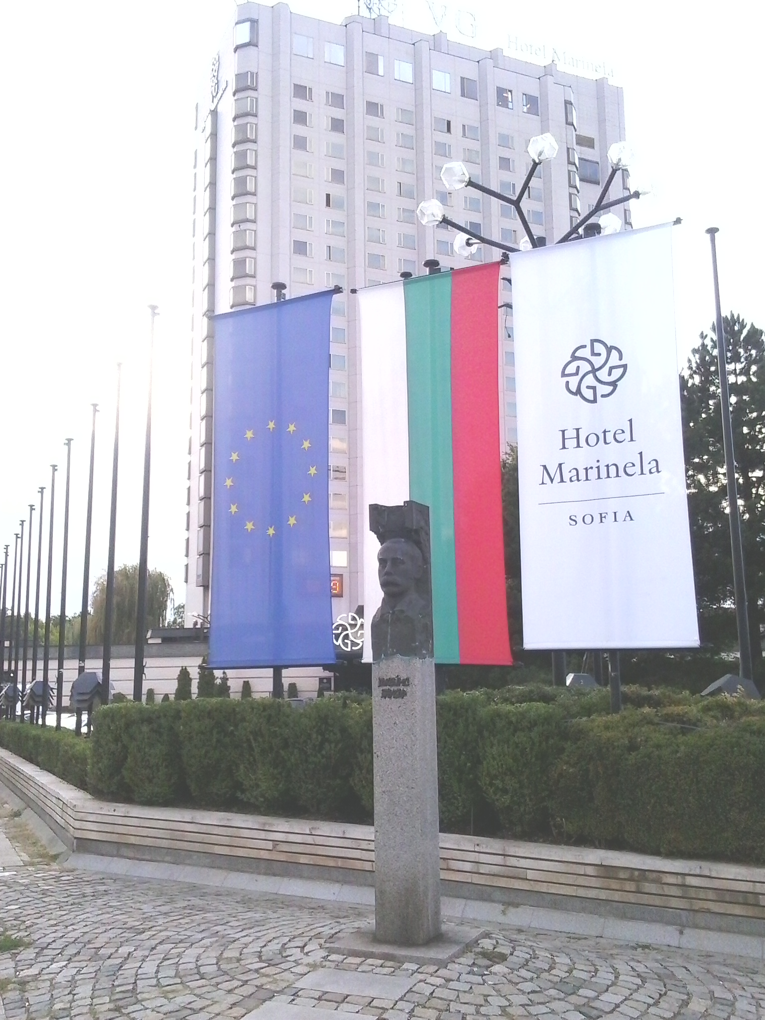 Паметник на Джеймс Баучер в София